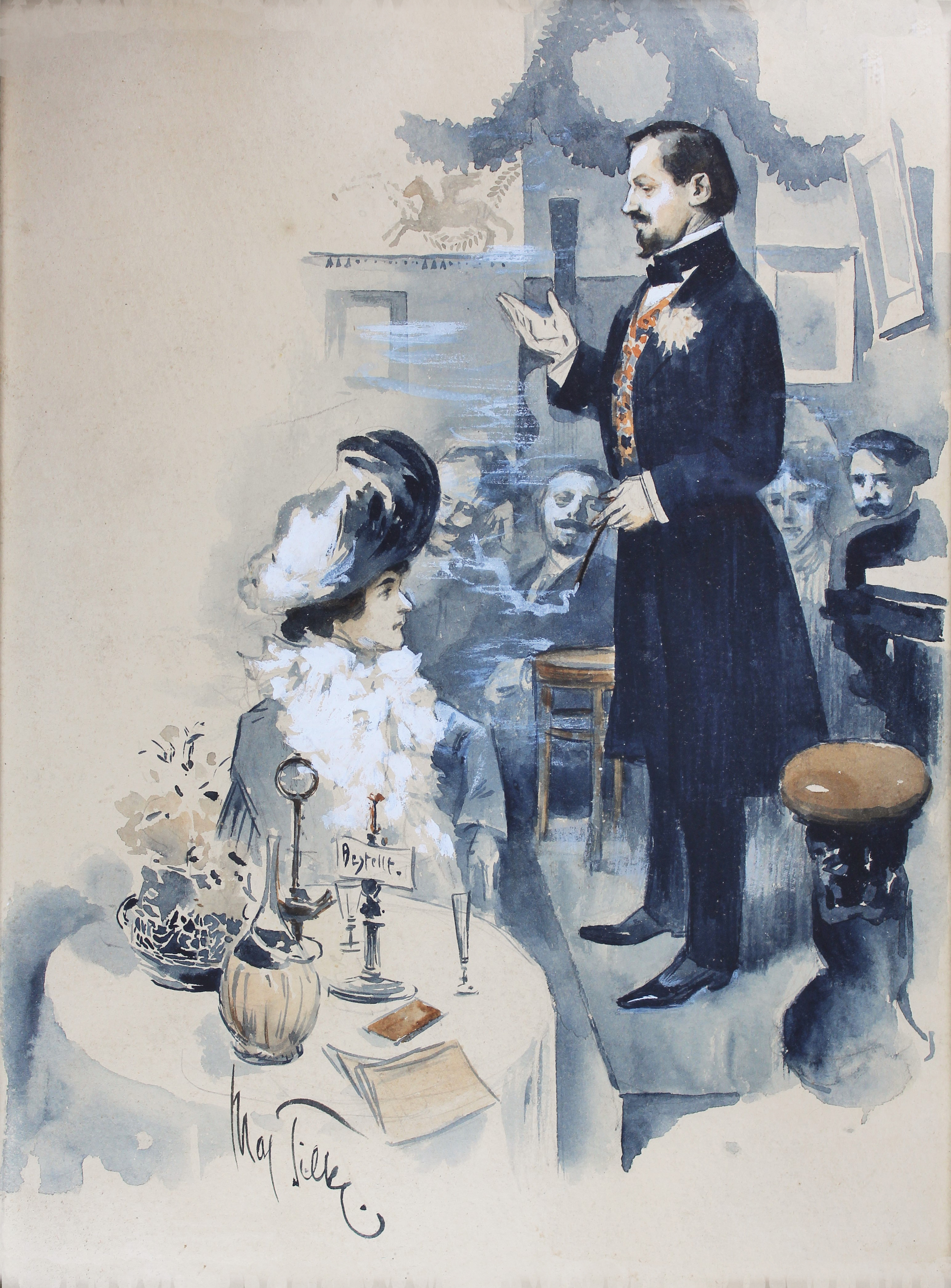 Selbstbildnis des Malers Max Tilke bei Eröffnung des Cabaret "Zum hungrigen Pegasus". Gouache auf Papier, Berlin um 1902, signiert. 24 cm x 33 cm.